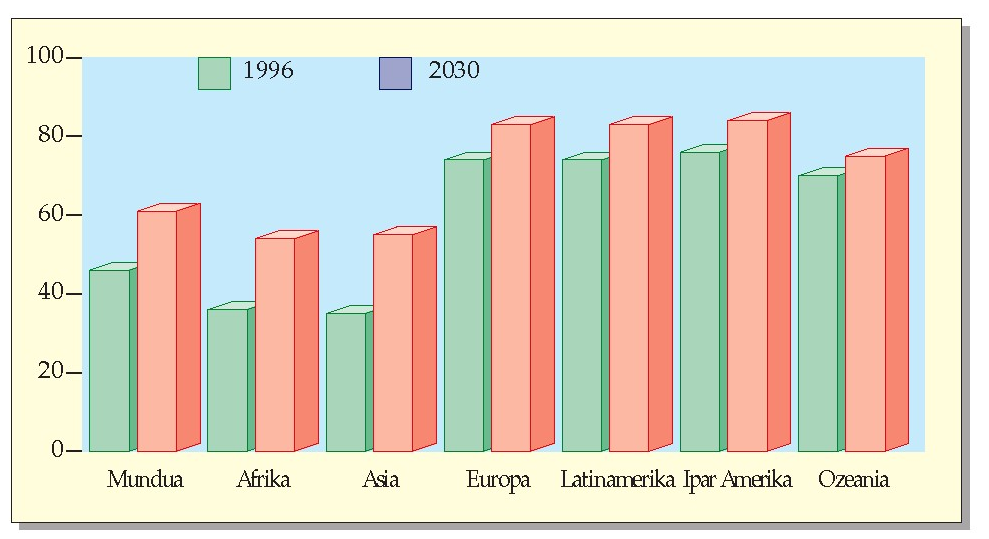 Gune urbanoetan bizi den biztanleria, %-tan. Iturria: Nazio Batuen Erakundea, 1996.